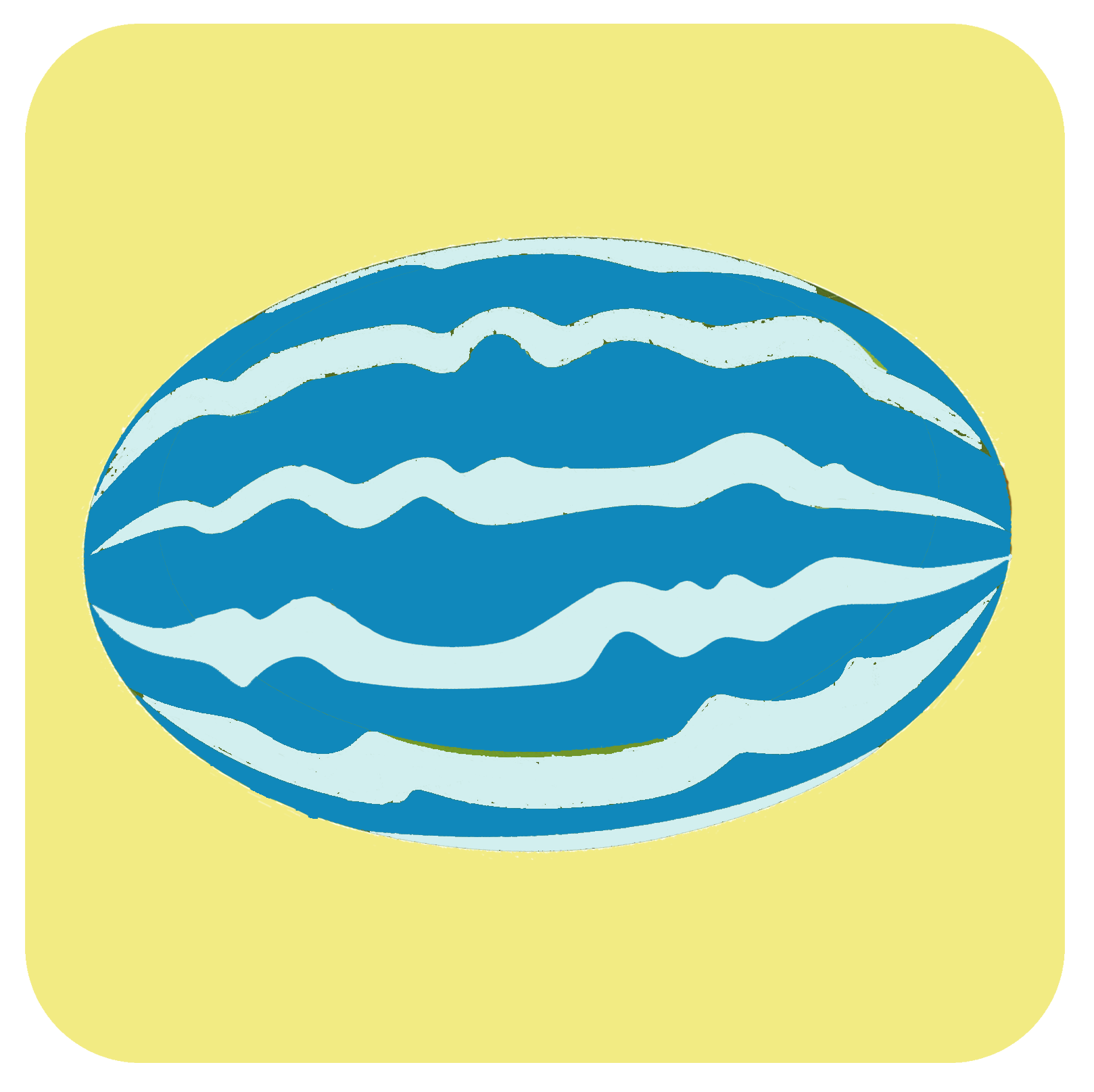 Símbolo utilizado para identificar a la estación Paine en 2001.